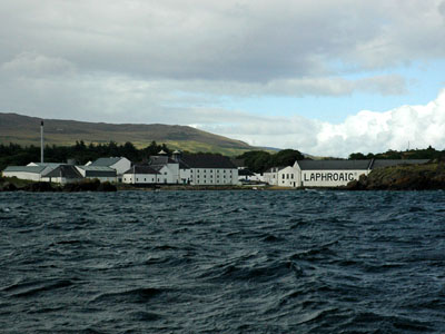 蘇格蘭艾拉島麥芽威士忌蒸餾廠 遺世孤立於大西洋岸的海邊，造就了艾拉島(Isle of Islay)威士忌獨特的口味，此區的威士忌酒廠堪稱是整個蘇格蘭威士忌領域裡面、口味最強烈的一派。 圖中所見為乘船自海上眺望拉弗格(Laphroaig)蒸餾廠的景象，該廠與隔鄰的拉格弗蘭(Lagavulin)與阿貝克(Ardbeg)三家蒸餾廠都位於艾拉島海風最強烈的西南海岸，皆以出品的酒煙燻重、口味強與海鹽氣味強烈而出名。 本圖片由上傳者User:SElephant拍攝於2004年8月。